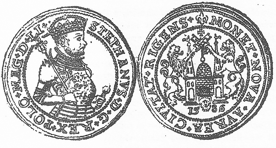 Dawna moneta polska miasta Rygi